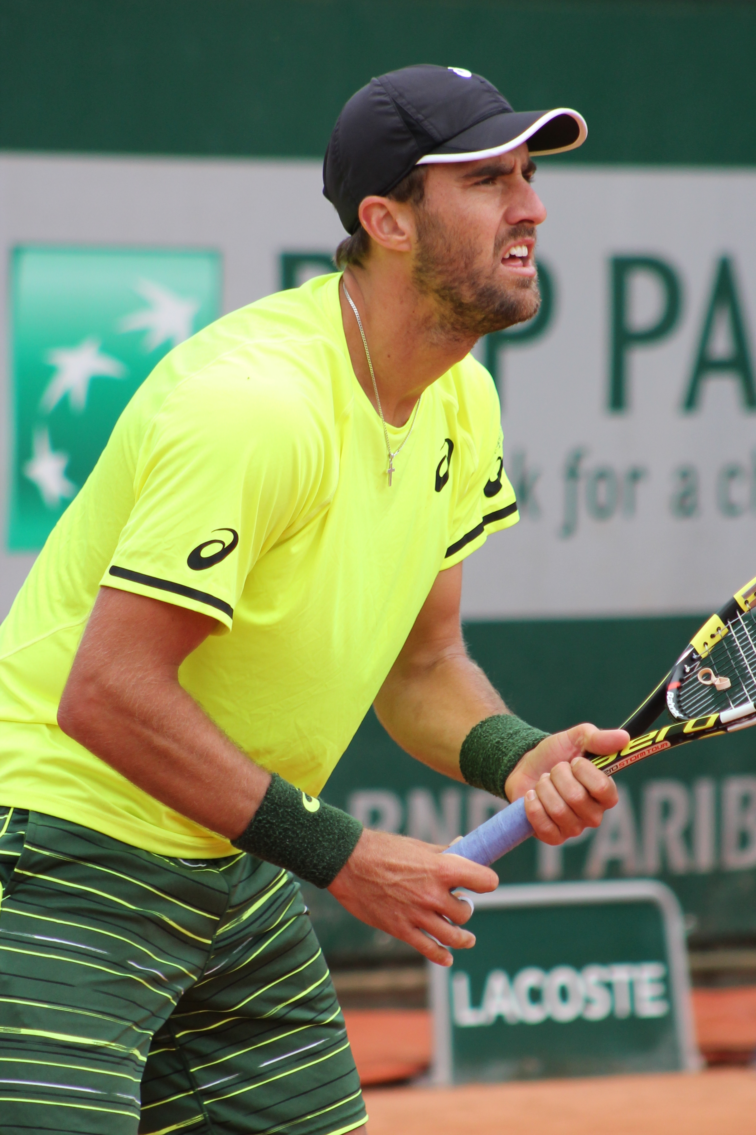 Johnson RG15 (2)